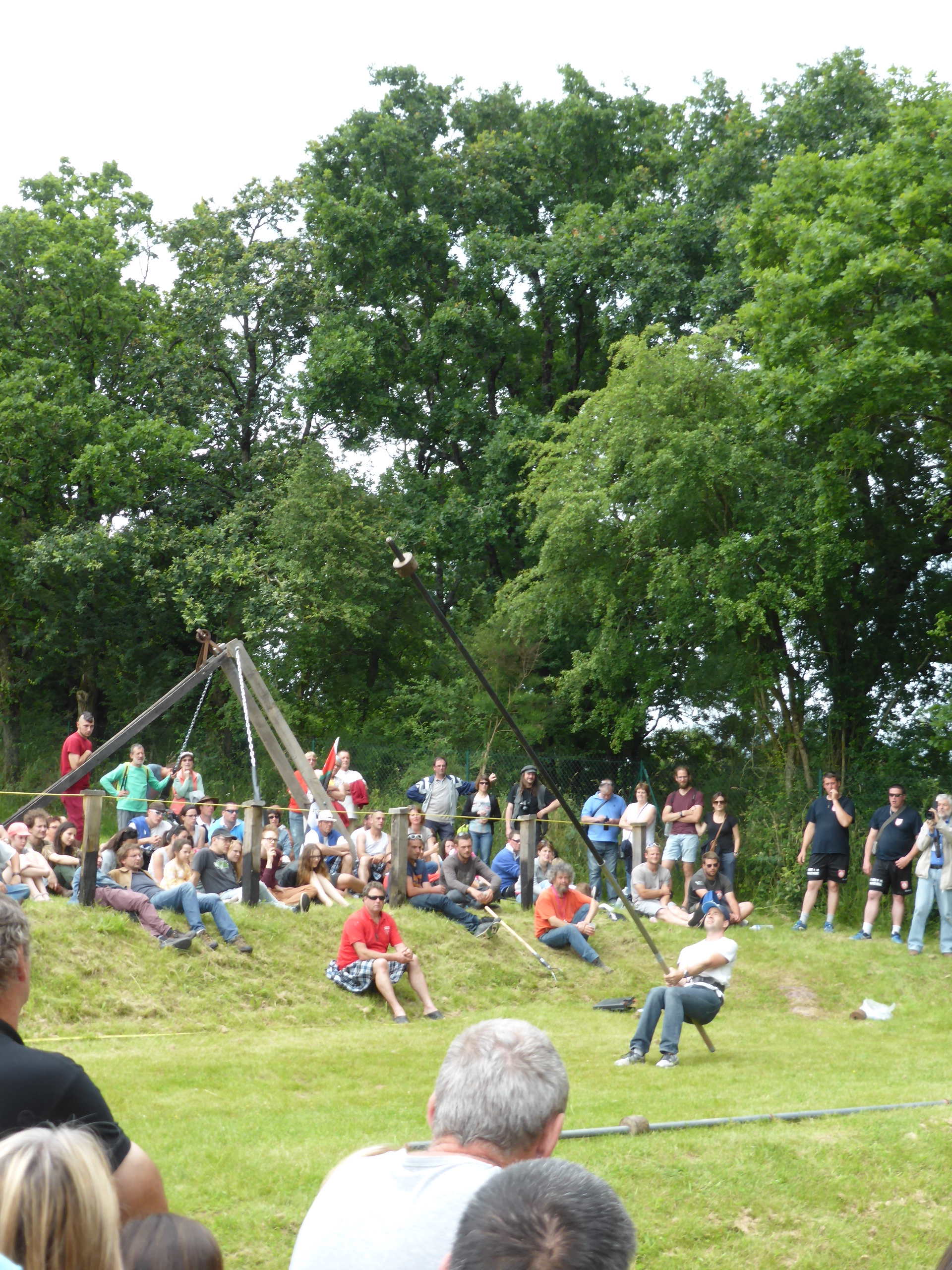 Concours de lever de perche à la Gallésie en Fête de Monterfil (35) en 2016